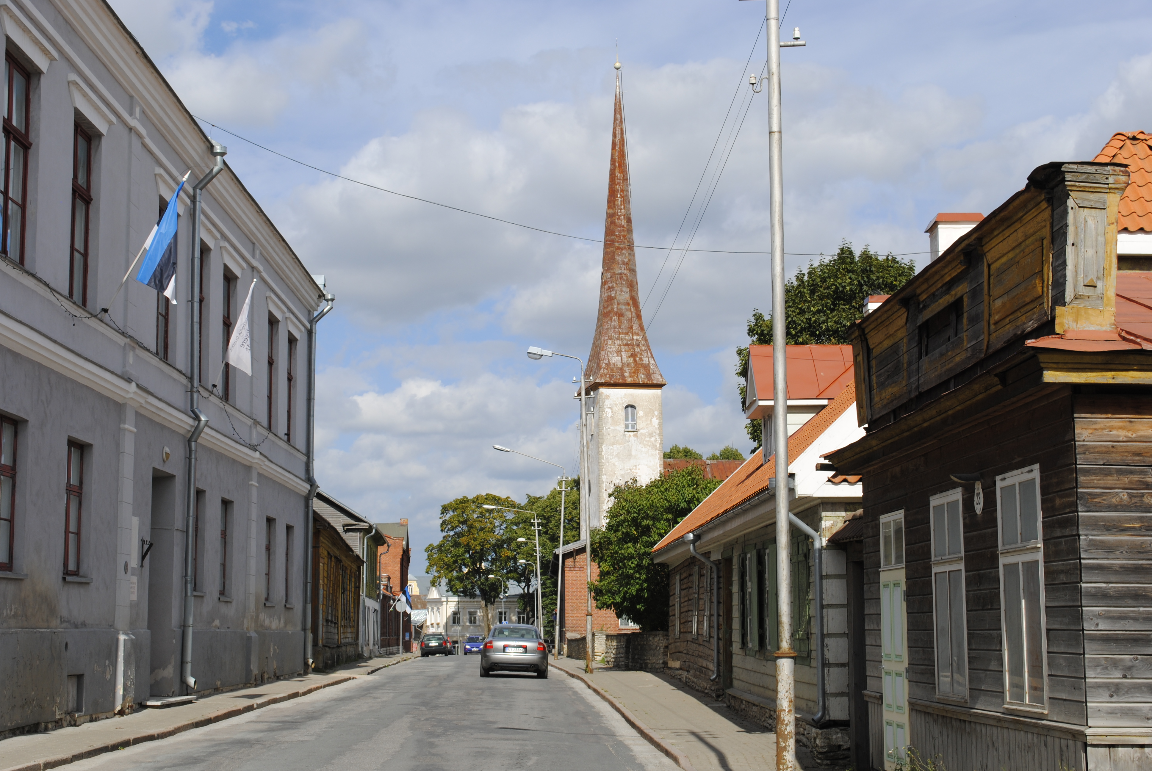 Straßenzug in Rakvere mit der Stadtpfarrkirche